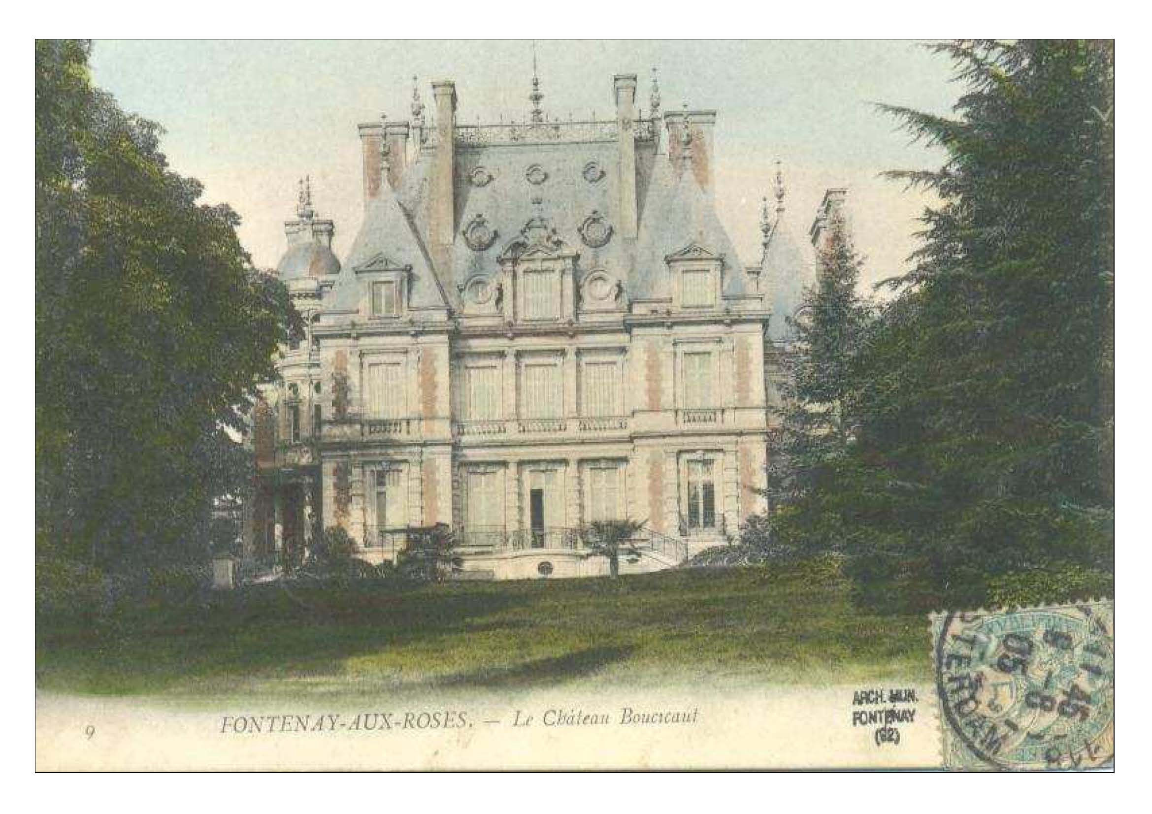 Château Boucicault in Fontenay-aux-Roses, Bauherrin: Marguerite Boucicault, Baujahr: 1879-1881, Architekt: Louis Charles Boileau, Abbruch 1954, Foto: 1900.